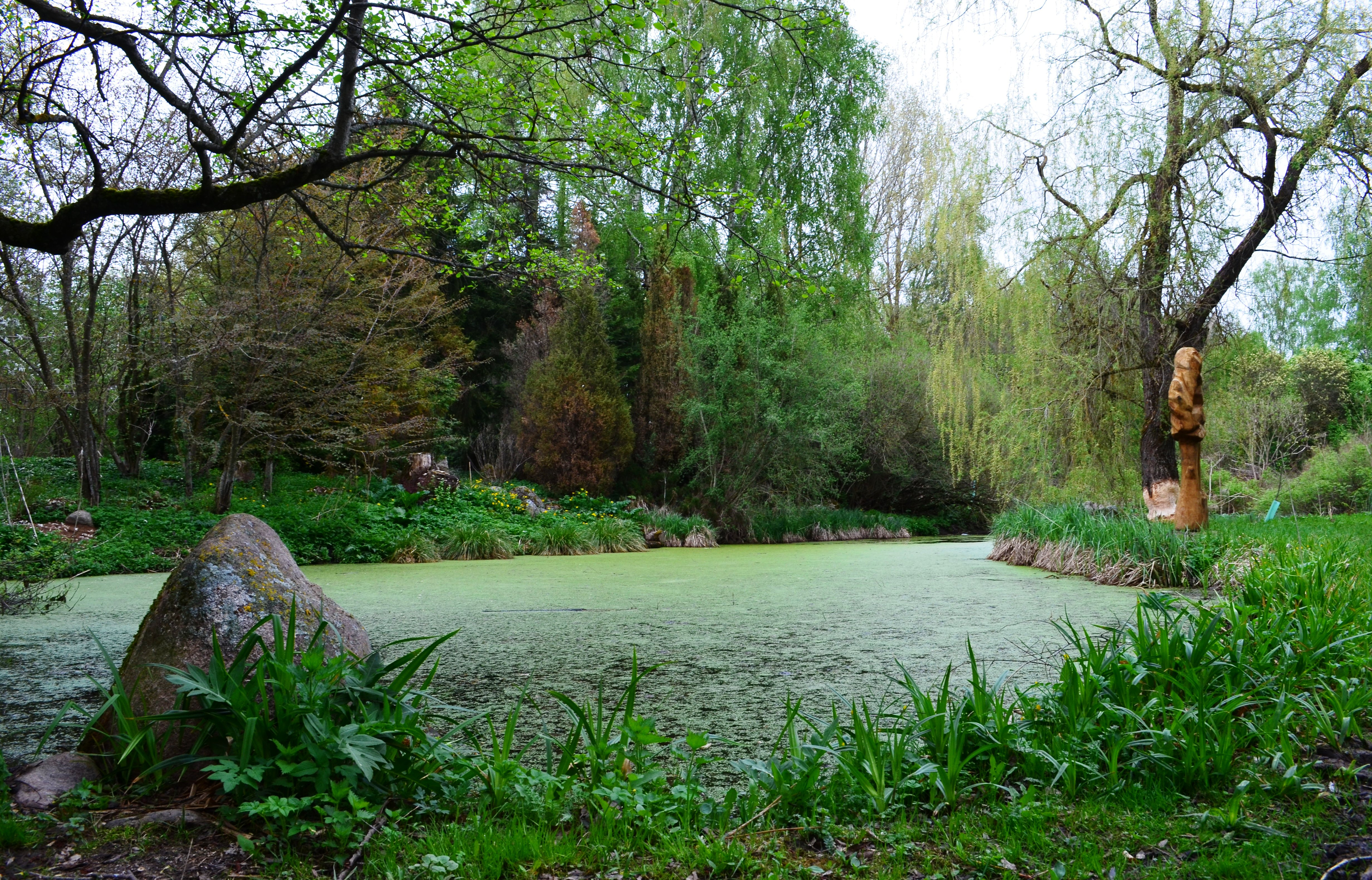 Skinderiško dendroparkas. Kėdanių r.